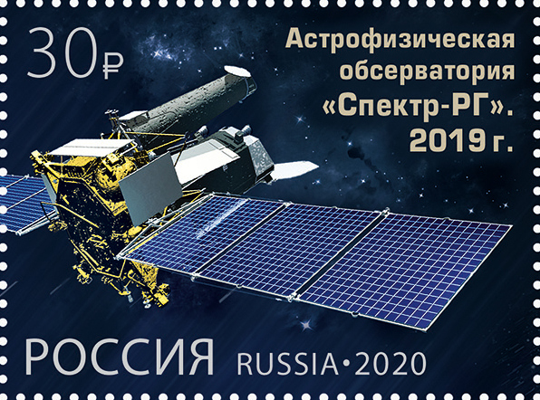 9 июня в обращение вышел почтовый блок с 3 марками «Россия — космическая держава»